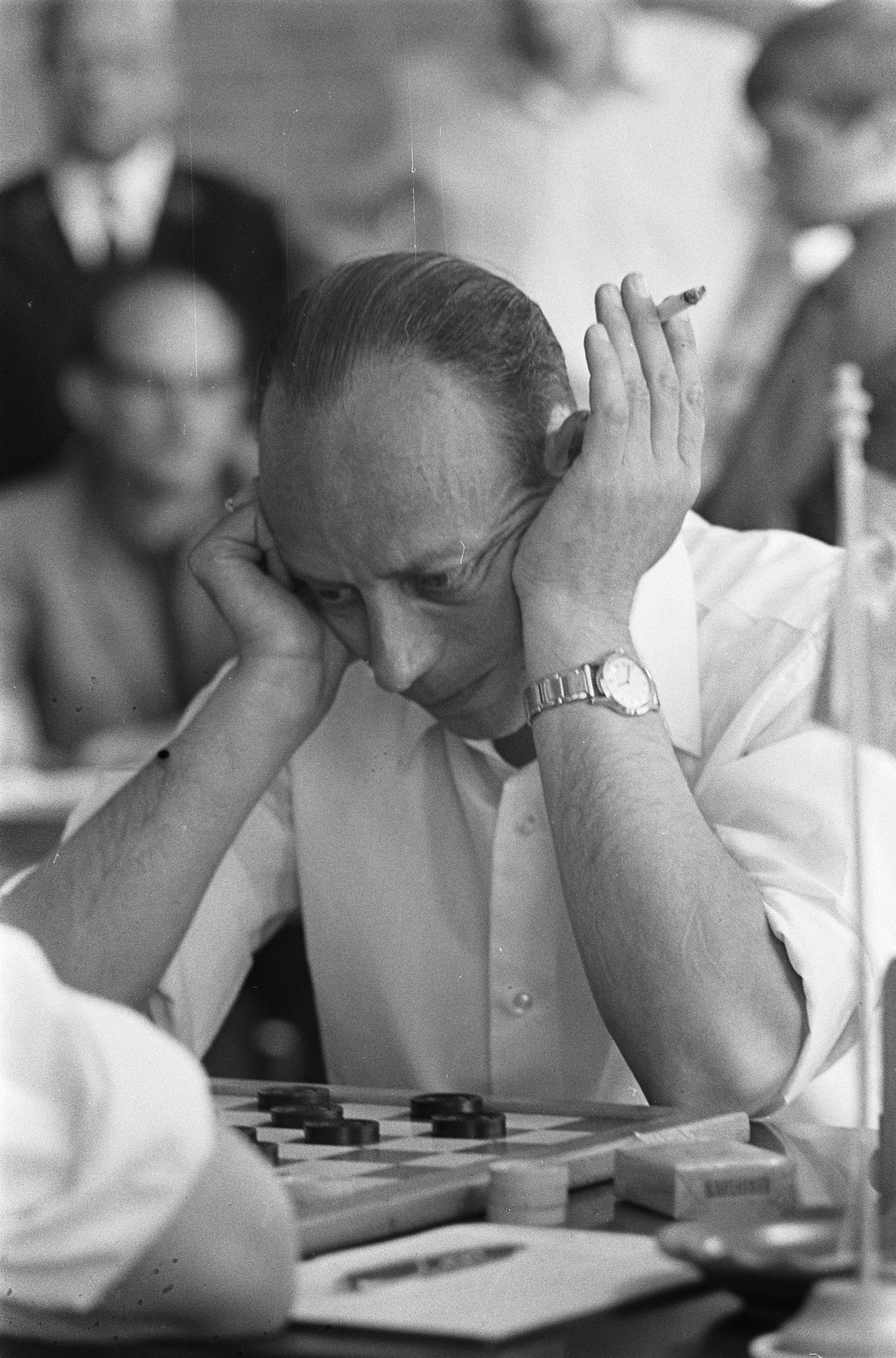 Collectie / Archief : Fotocollectie Anefo Reportage / Serie : [ onbekend ] Beschrijving : Dammen Nederland tegen Rusland. P. Roozenburg Datum : 4 juli 1968 Trefwoorden : dammen Persoonsnaam : Roozenburg, Piet Fotograaf : Kroon, Ron / Anefo, [onbekend] Auteursrechthebbende : Nationaal Archief Materiaalsoort : Negatief (zwart/wit) Nummer archiefinventaris : bekijk toegang 2.24.01.05 Bestanddeelnummer : 921-4887